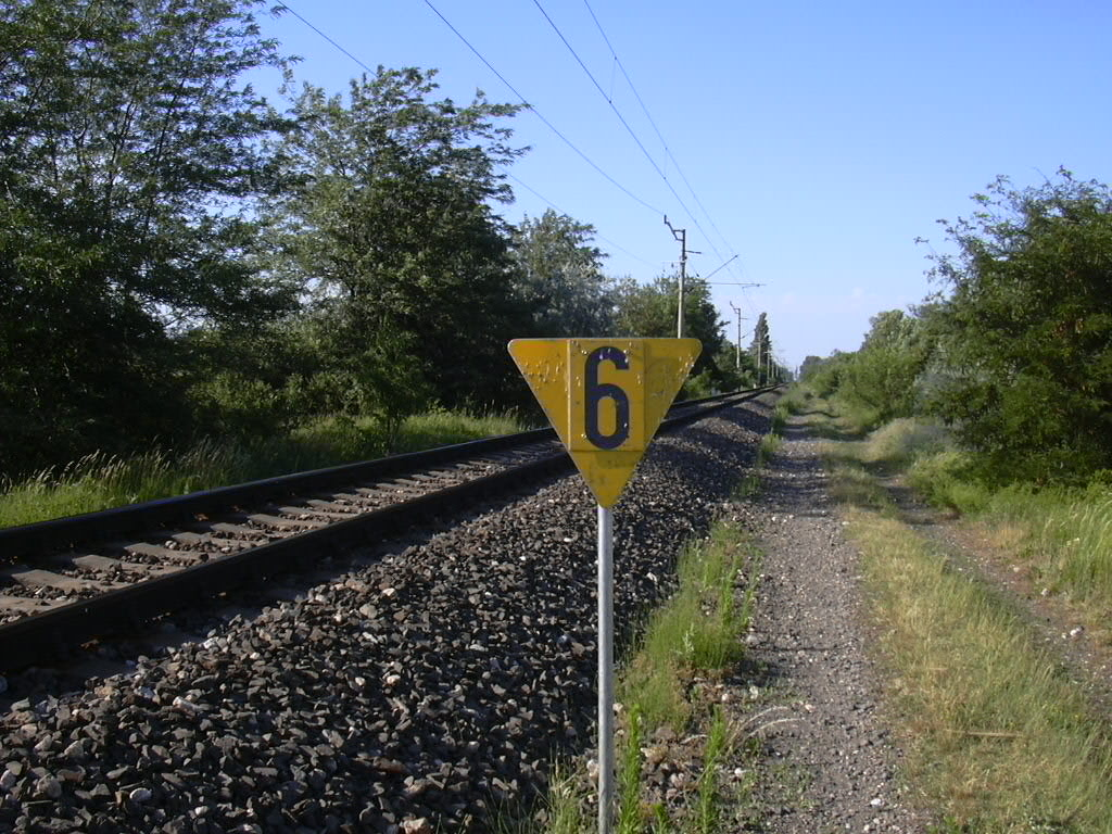 Lassújel a 140-es vasútvonalon a felújítás előtt